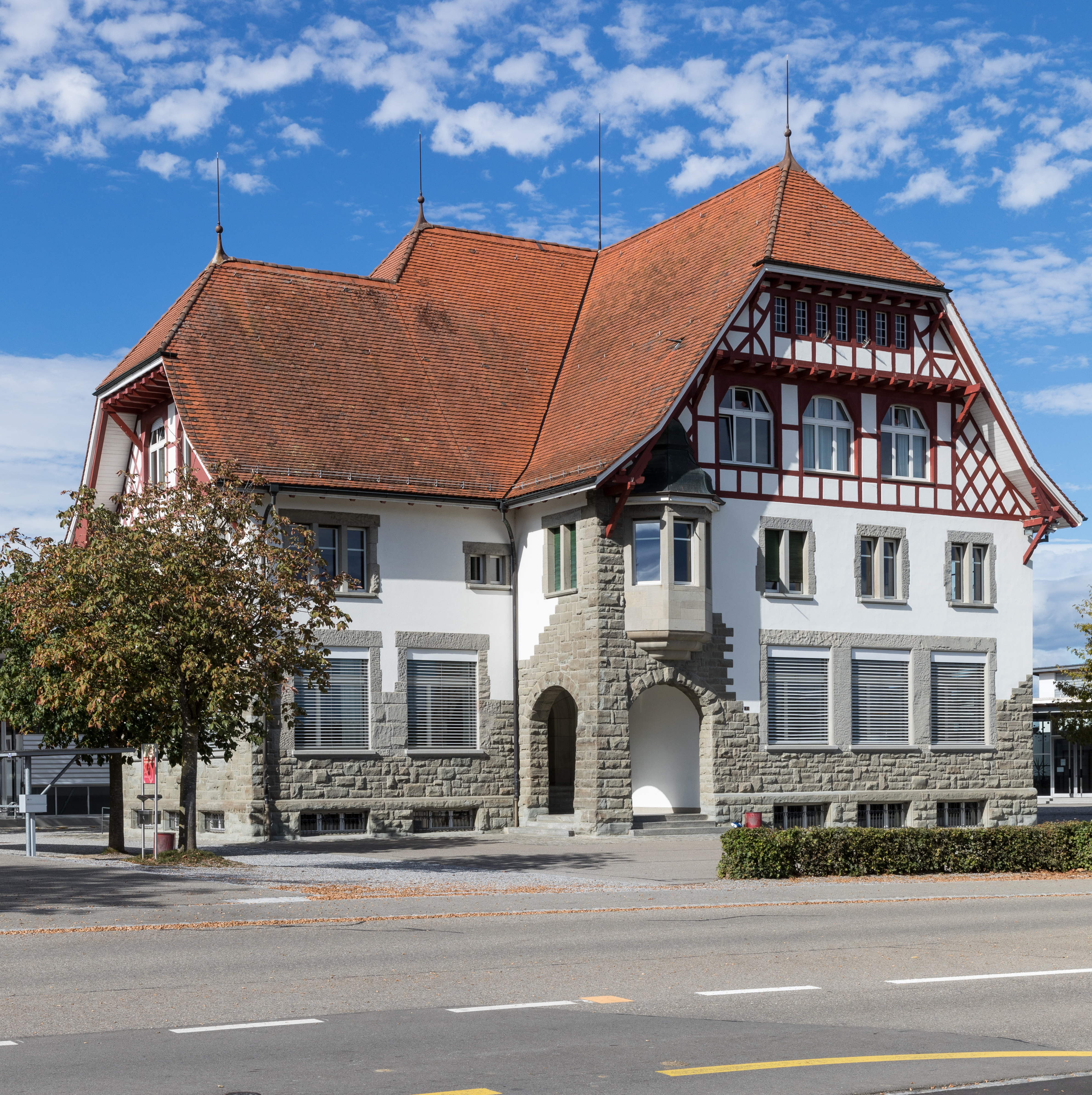 Sekundarschulhaus